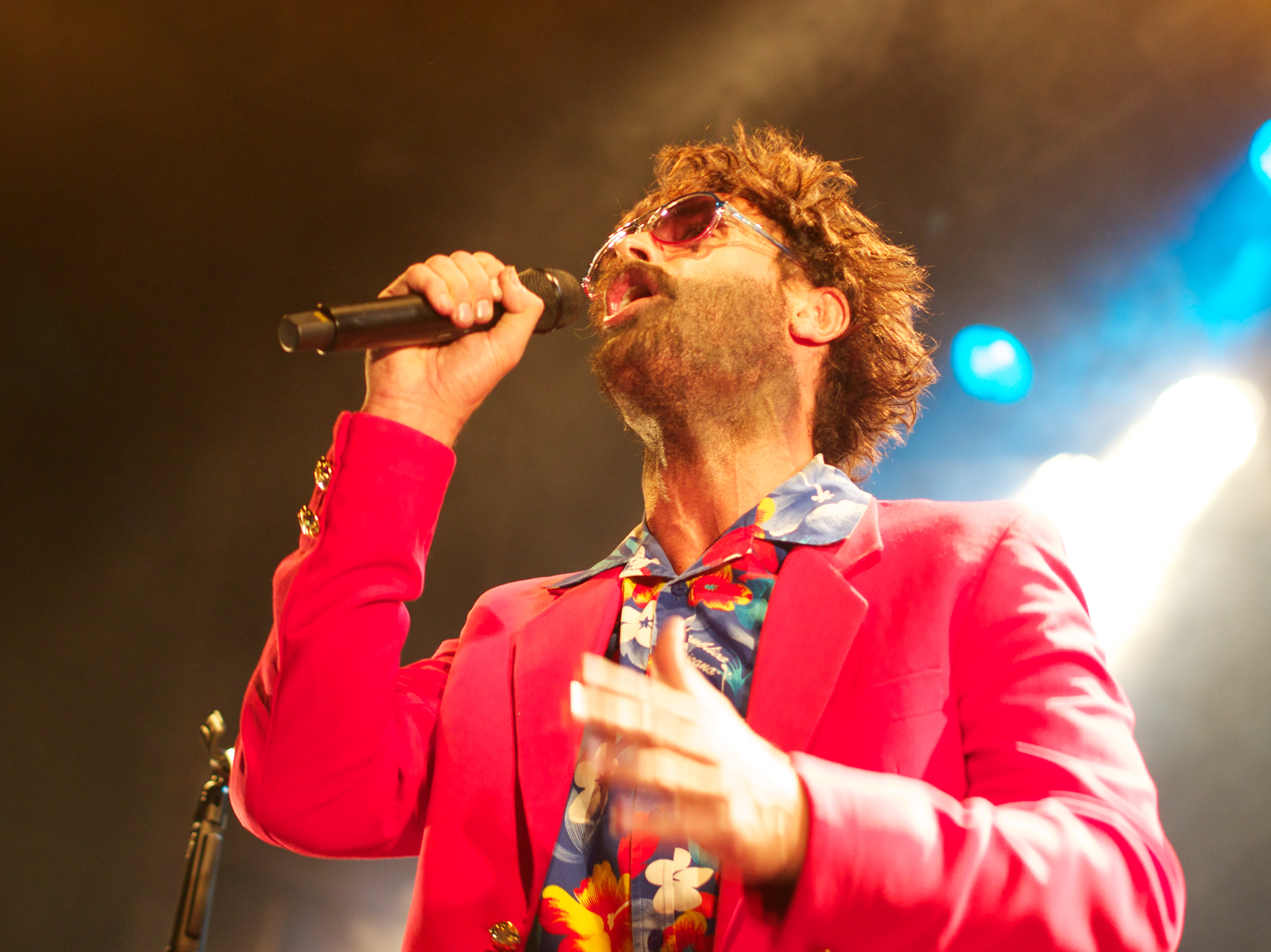 Der Berner Komiker Semih Yavsaner aka Müslüm auf der Bühne des Openairs auf dem Bundesplatz 2013